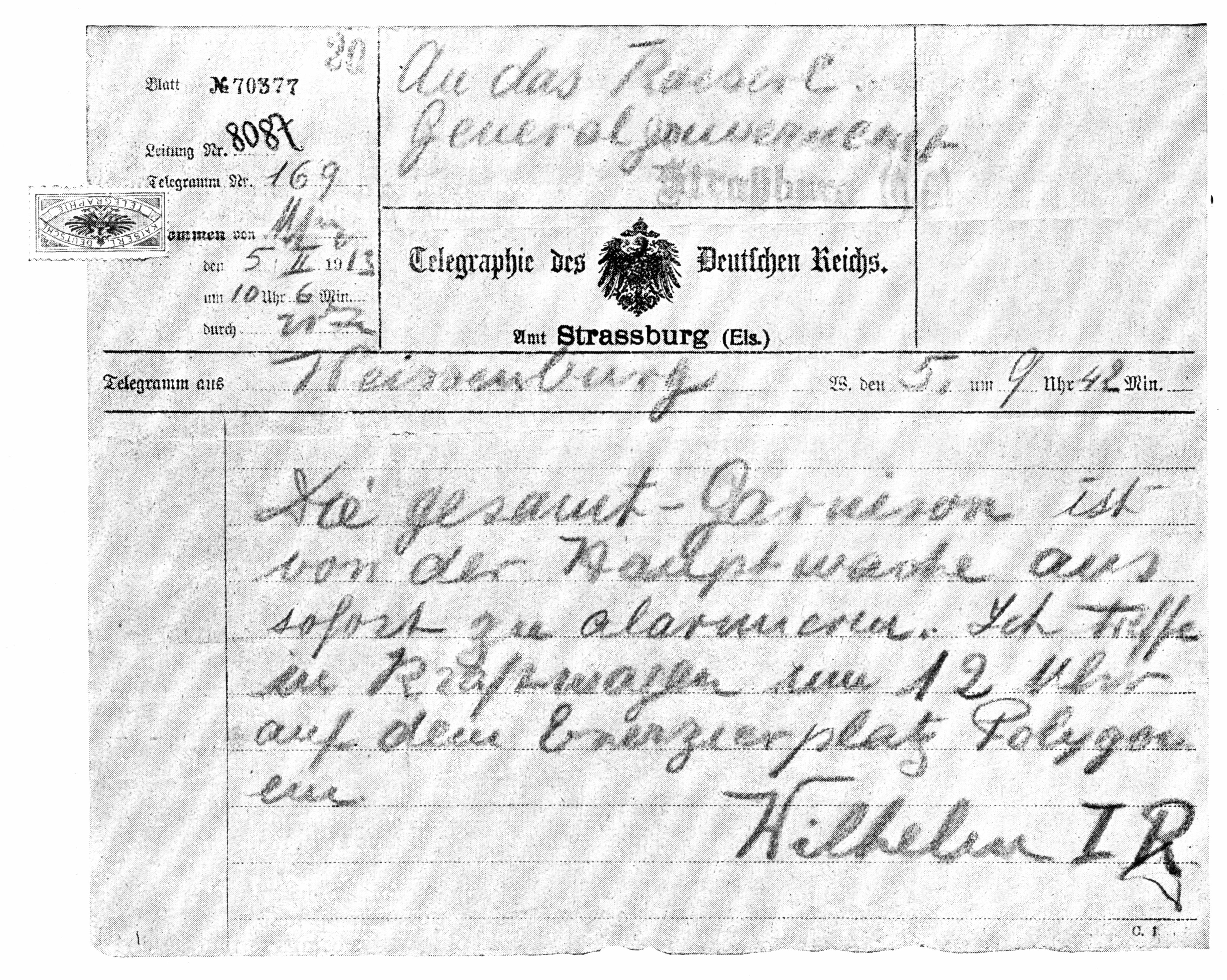 A Fake Telegram from the Kaiser telling the Gouvernor of Strasburg to prepare for his visit at twelve o'clock at noon of the same day Text: An das Kaiserl. Generalgouvernemt. Die gesamt-Garnison ist von der Hauptwache aus sofort zu alarmieren. Ich treffe in Kraftwagen um 12 Uhr auf dem Exerzierplatz Polygon ein. Wilhelm IR